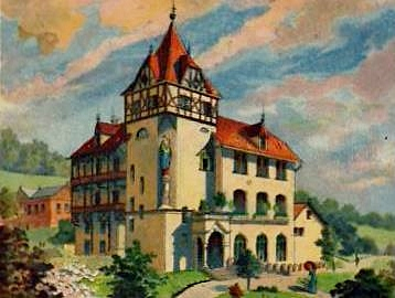 Restaurant und Villa Rosenhügel in Bad Kissingen-Garitz auf dem Altenberg; heute steht an dieser Stelle die HESCURO-Kurklinik Regina